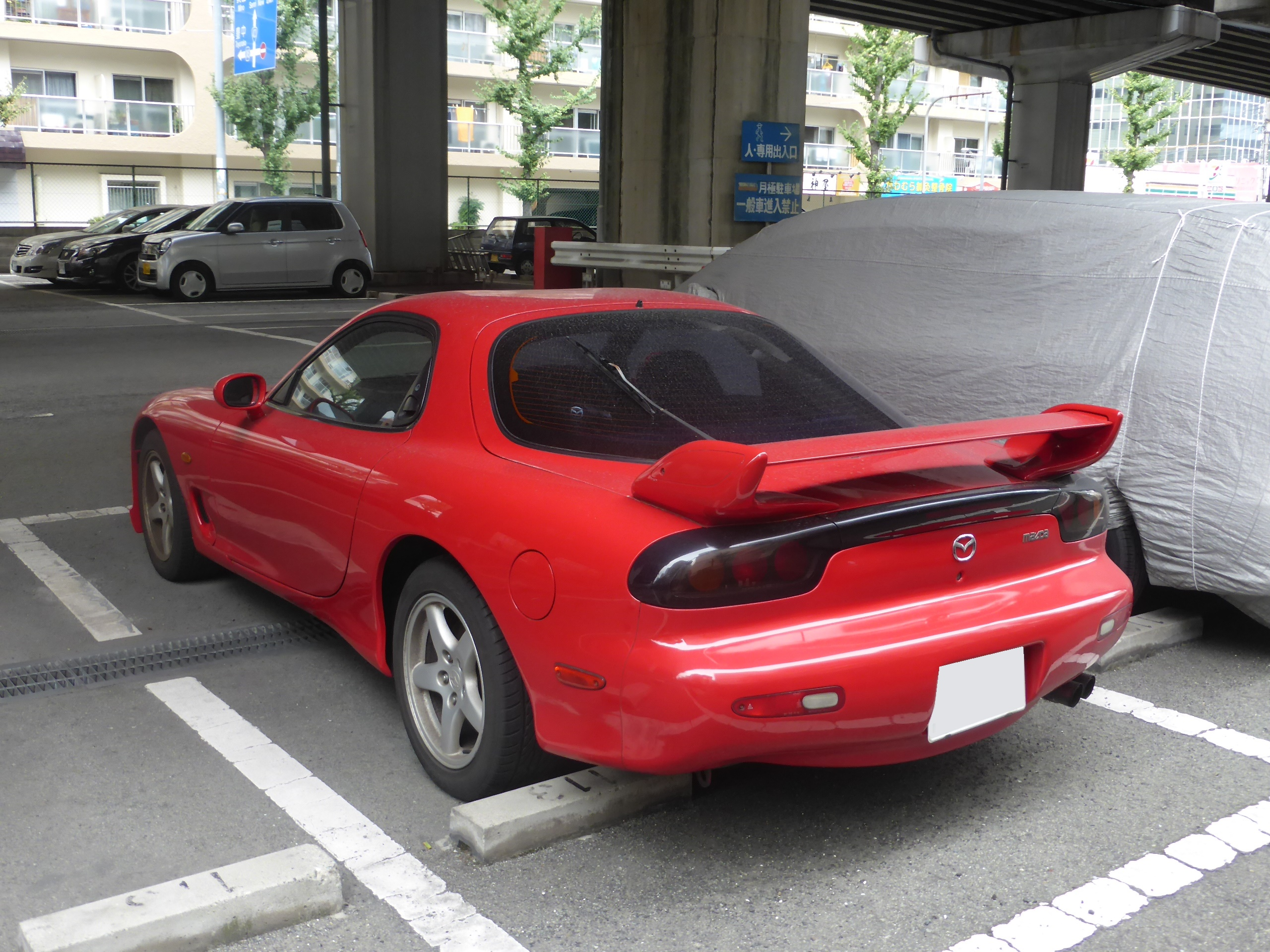 FD3S型マツダ・RX-7をリアから撮影。